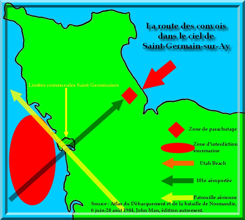 Carte rendant compte de la route des convois durant la seconde guerre mondiale entrant ou quittant l'espace français en survolant le havre de Saint-Germain-sur-Ay